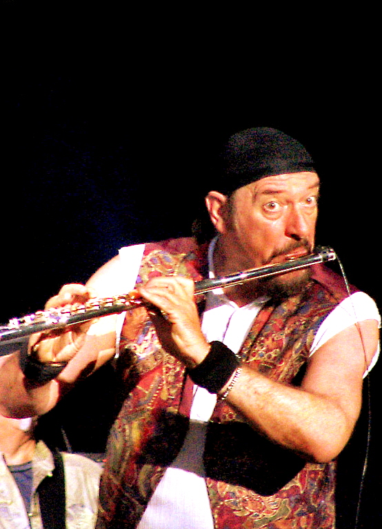 Gemaakt op 5 mei in het Teatro Nazionale, Milaan, Italië.